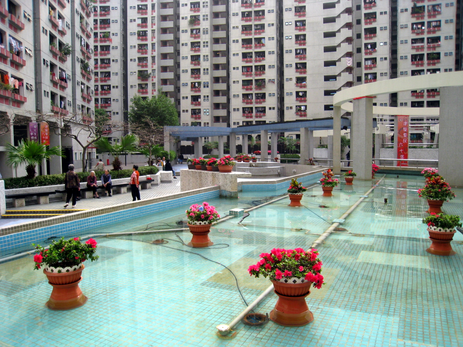 Ka Wai Chuen Garden Area